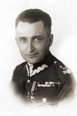 Generał August Emil Fieldorf(1895-1953) - polski dowódca, oficer Wojska Polskiego, organizator i dowódca Kedywu Armii Krajowej